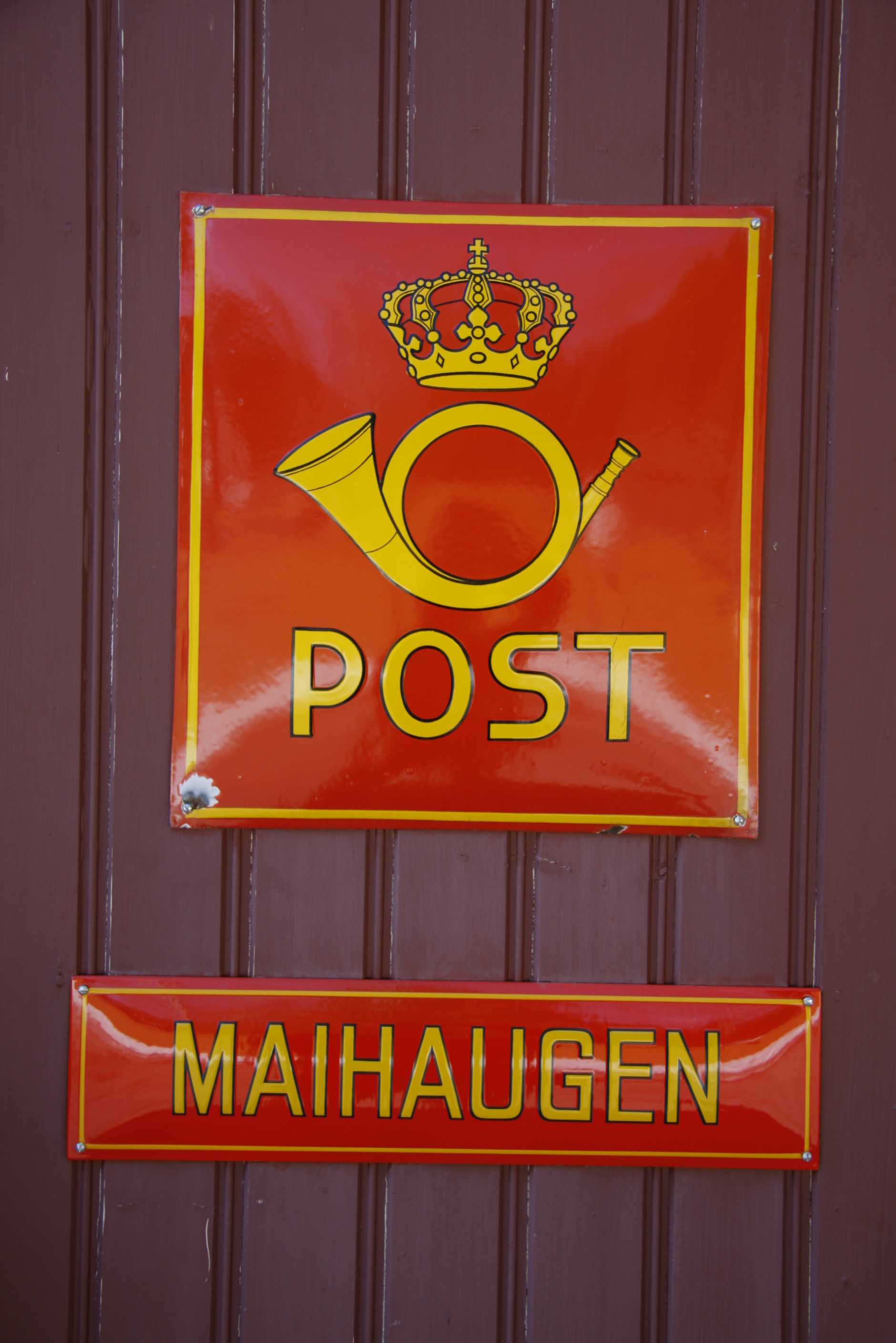 _MG_1746